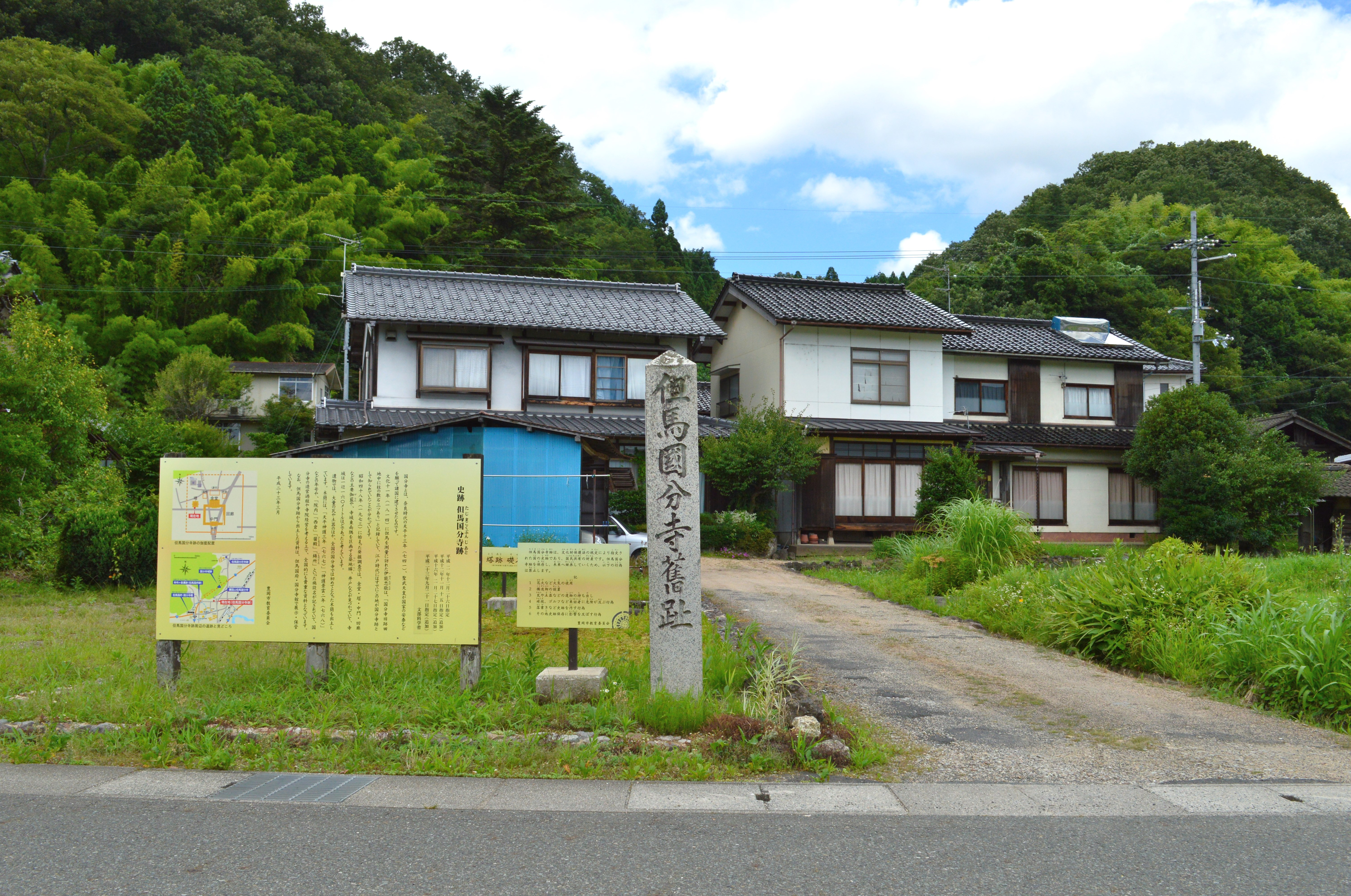 但馬国分寺跡 石碑